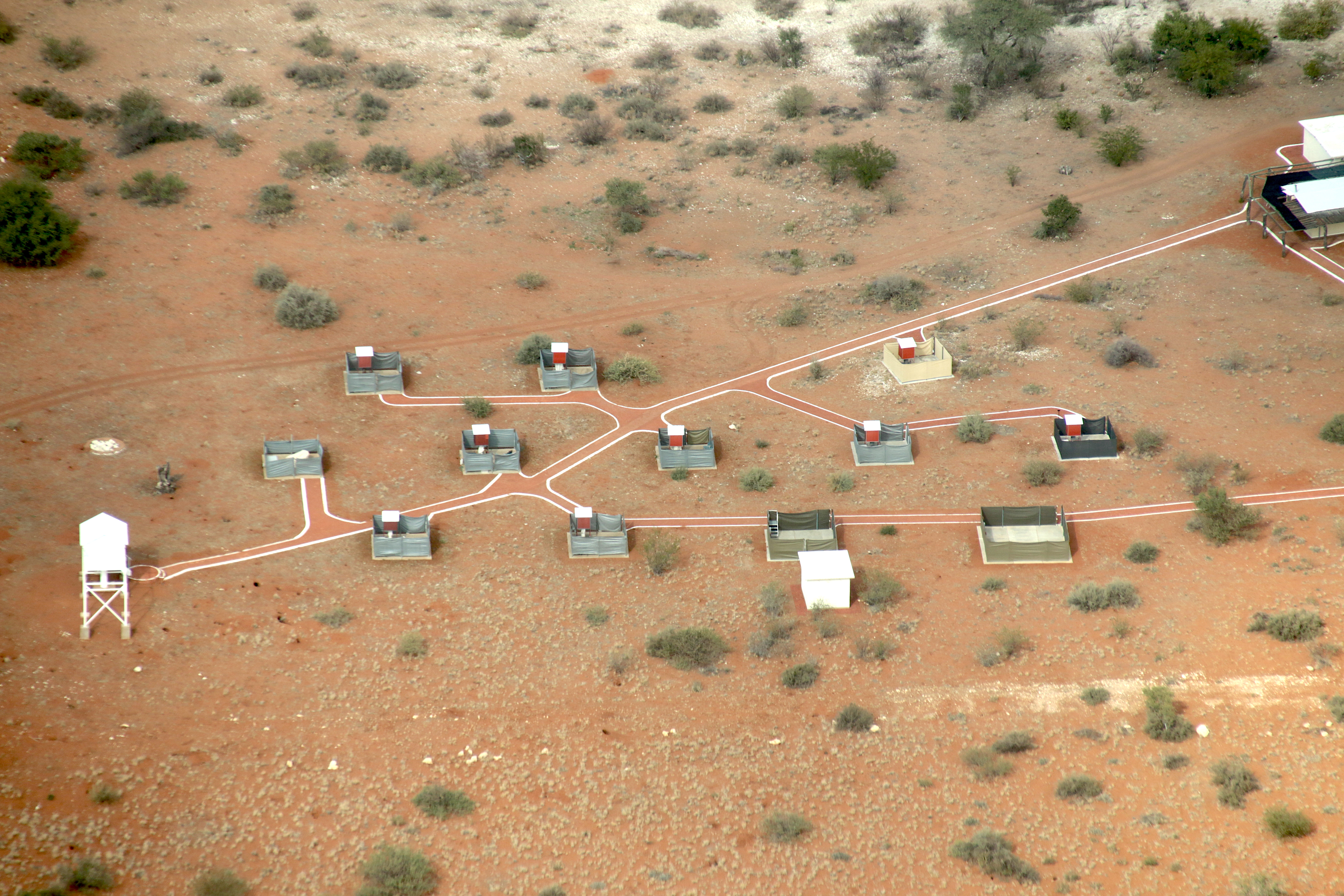 Astronomische Beobachtungsstände auf der Astrofarm Kiripotib, Namibia